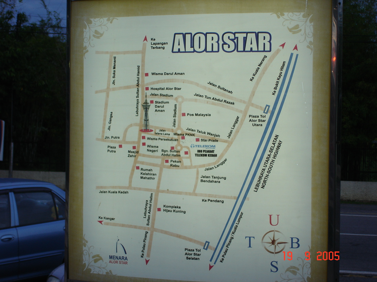 La bildo estas kopiita de en. La originala priskribo estas